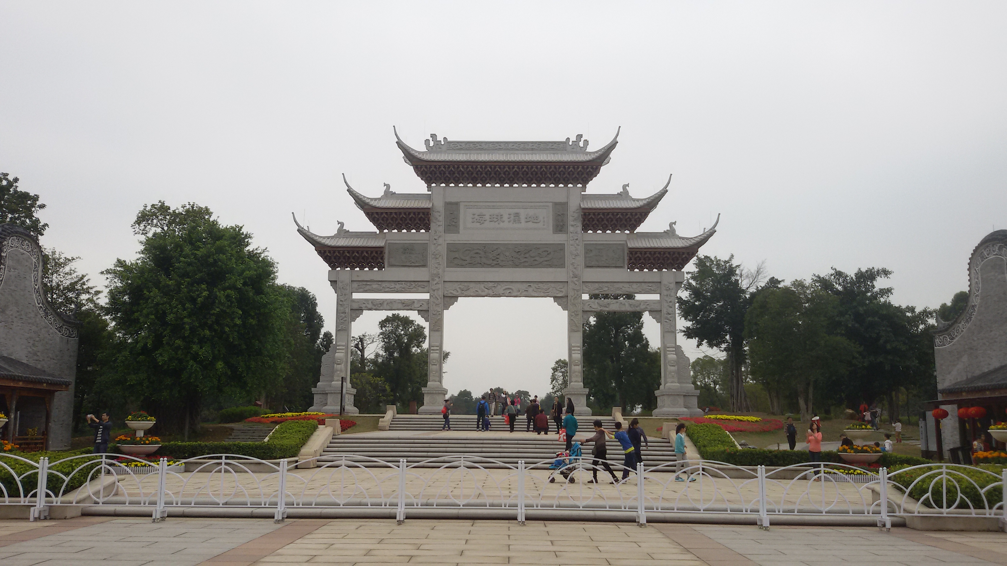 粵語: 海珠濕地嘅牌坊